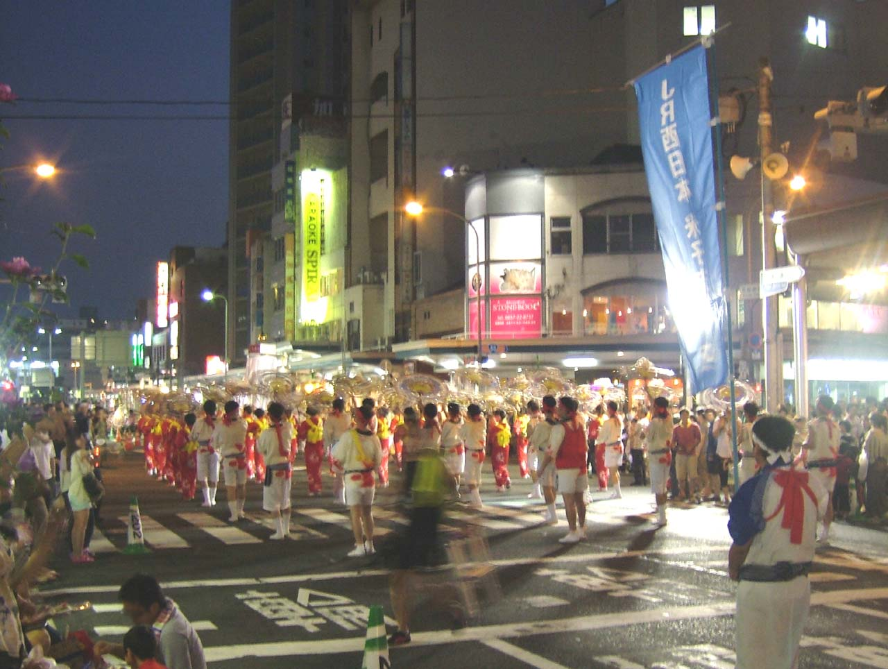 鳥取しゃんしゃん祭